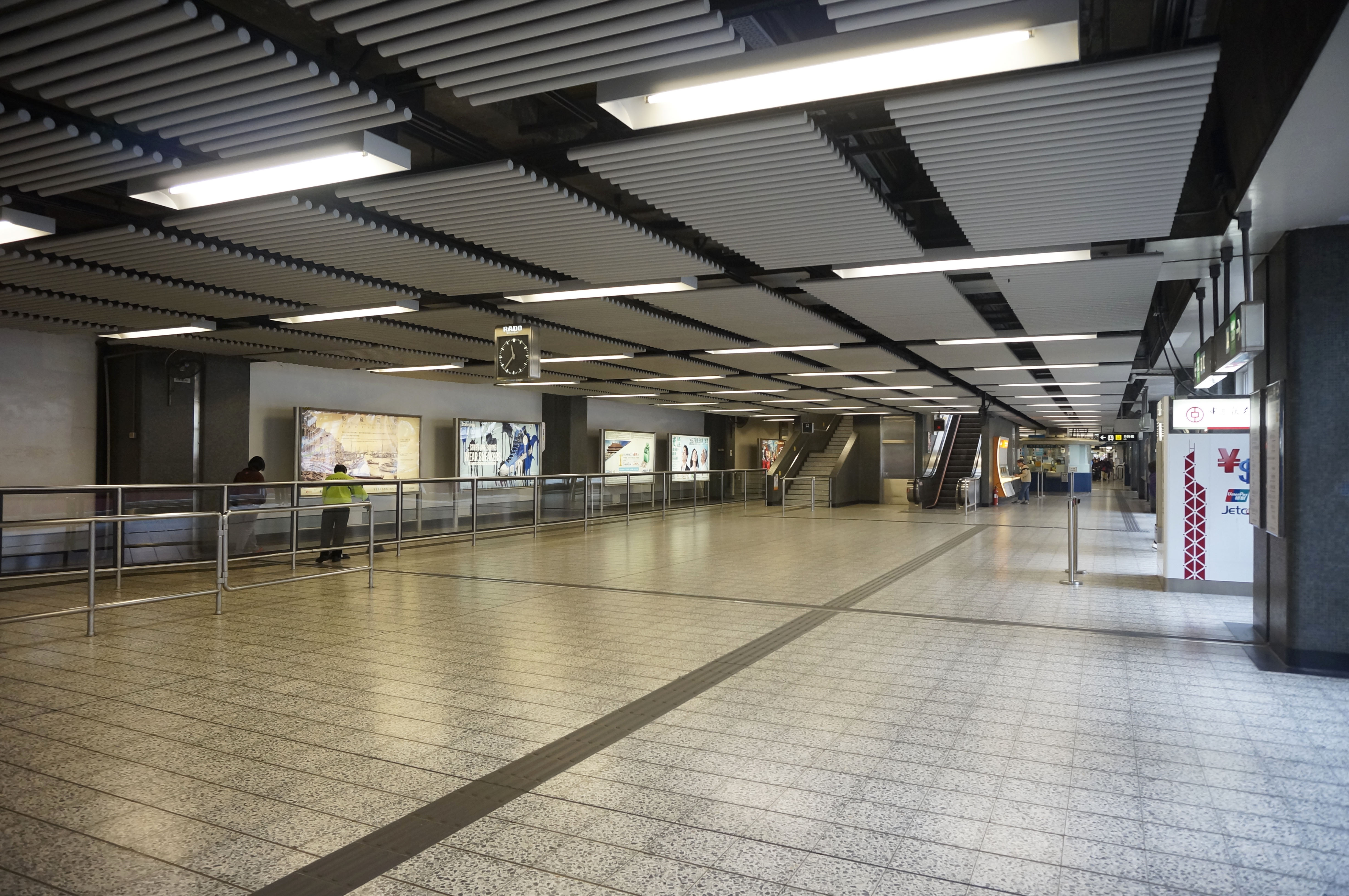 港鐵九龍灣站大堂